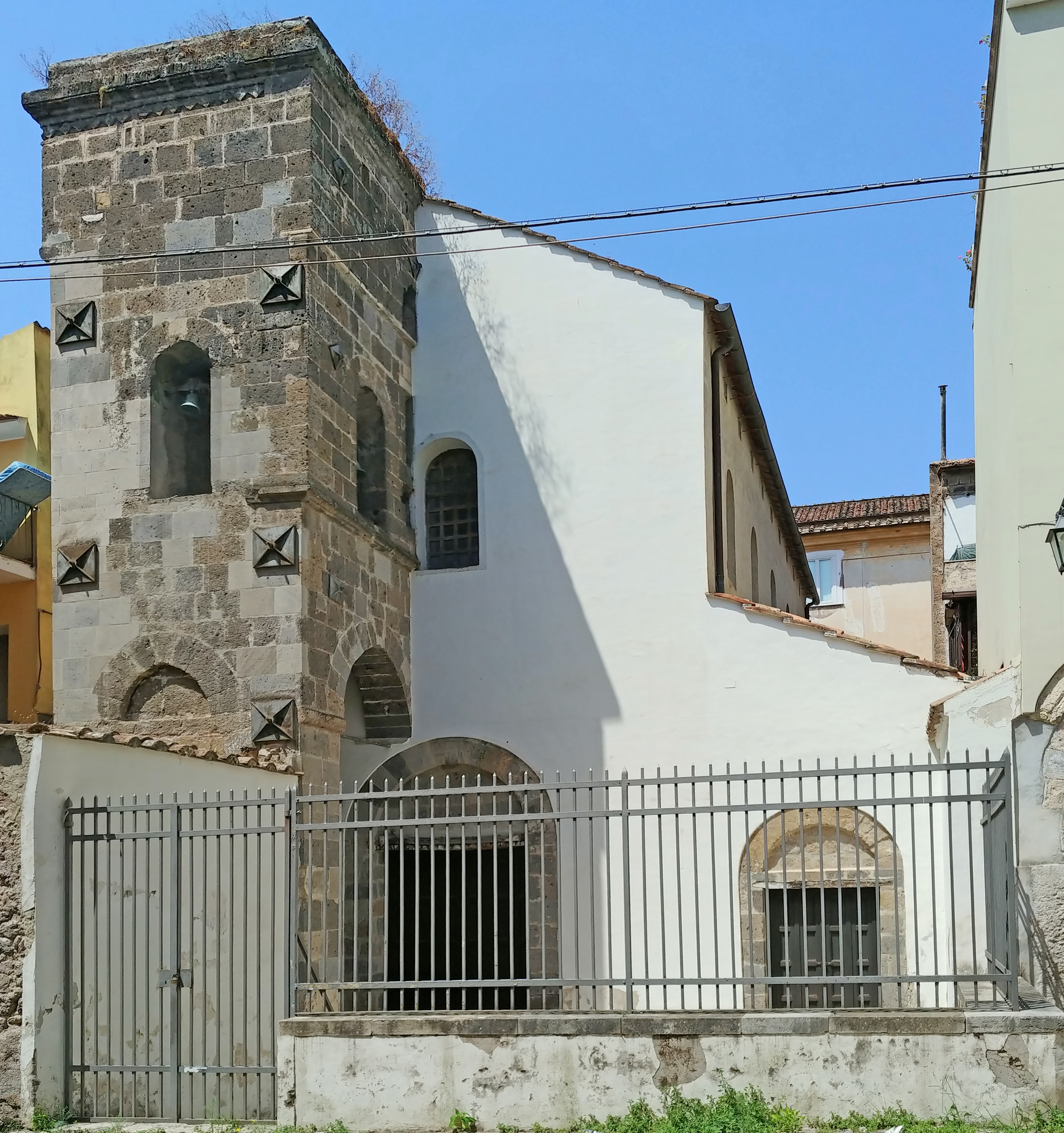 Facciata e campanile.